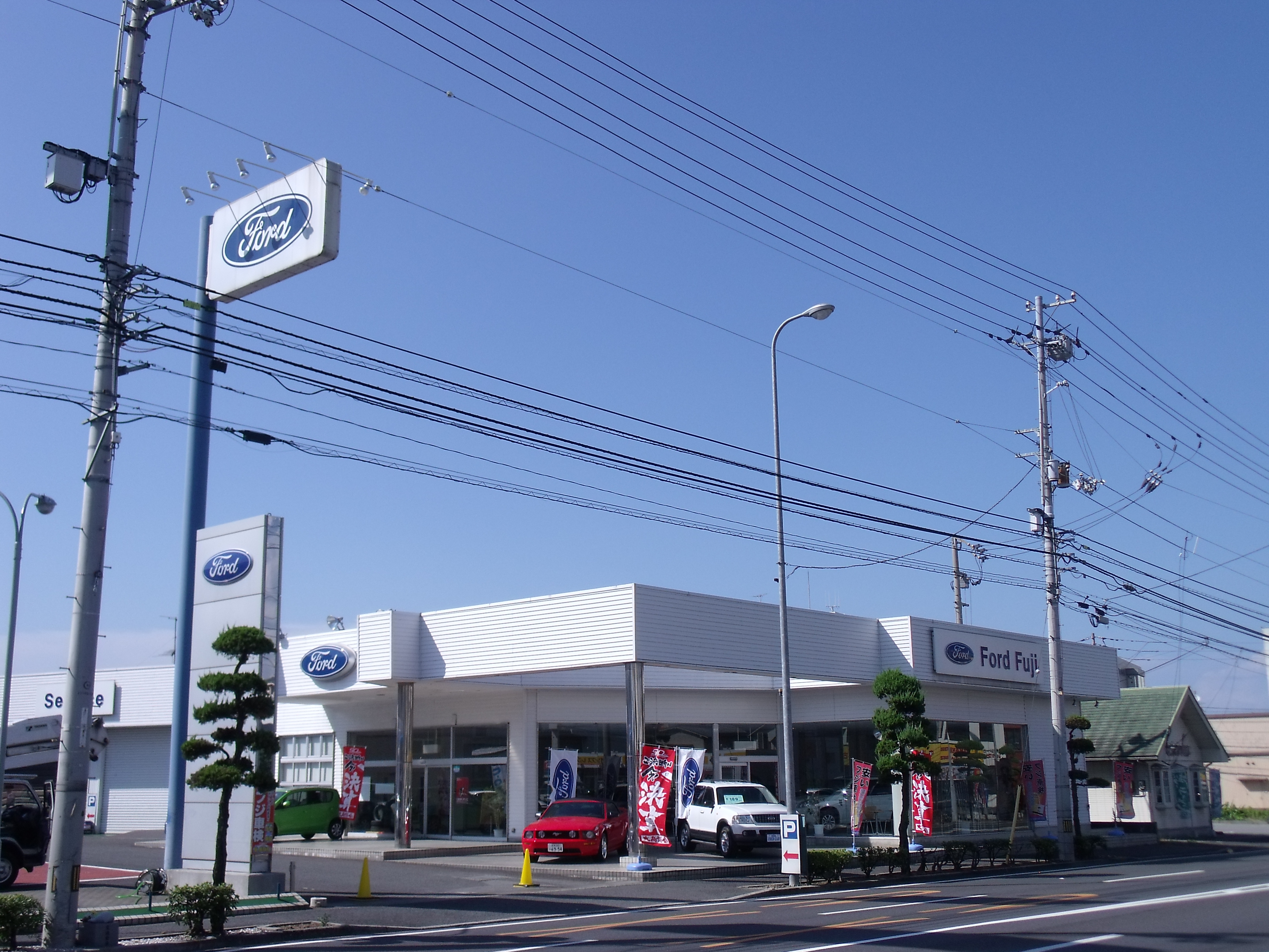 2010年撮影